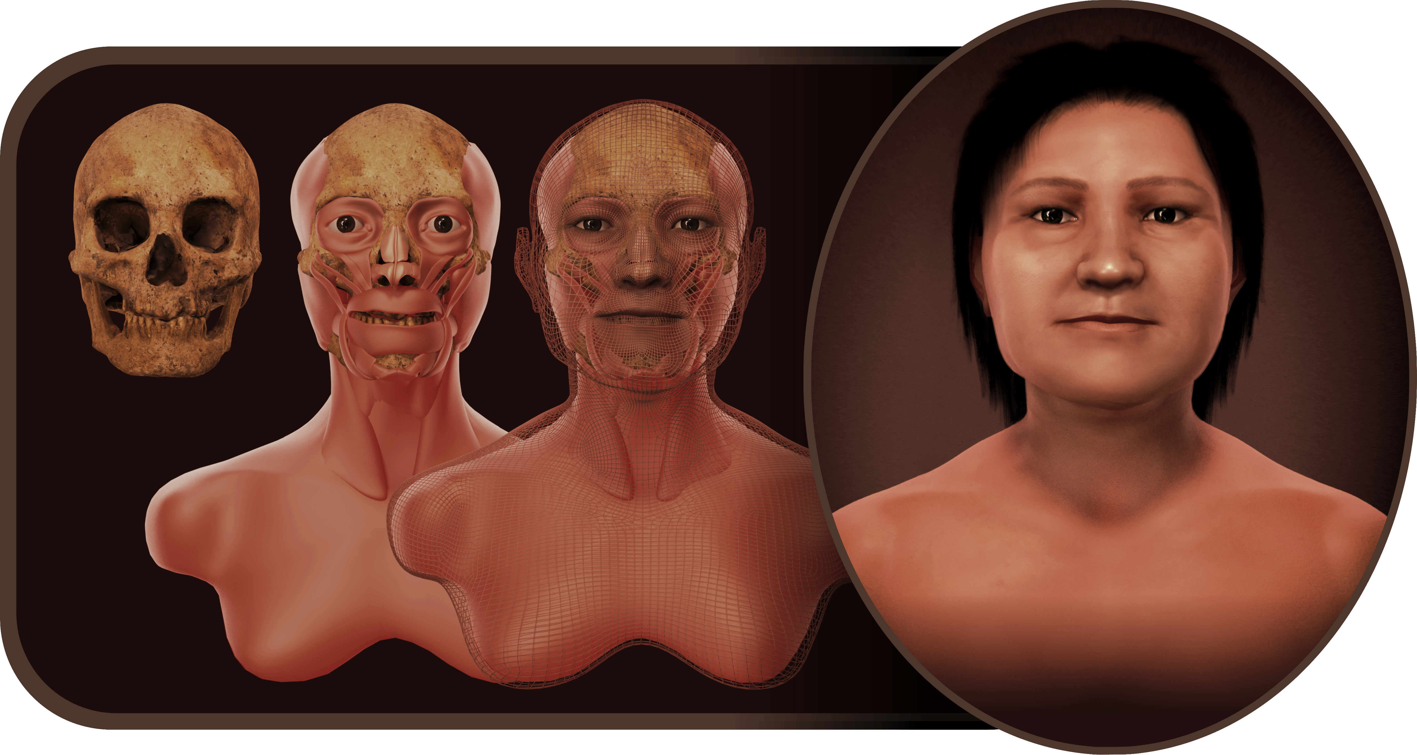 A reconstrução facial da "Avó dos Uruguaios" é um trabalho conjunto de Cicero Moraes com o Museu de Arte Precolombino e Indígena (MAPI), o XIV Congreso de la Sociedad Latinoamericana de Rehabilitación Buco Maxilo Facial e a Universidad de la República (UdelaR).